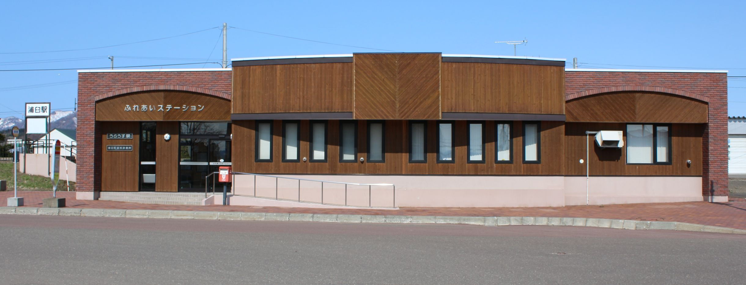 JR札沼線・浦臼駅の駅舎